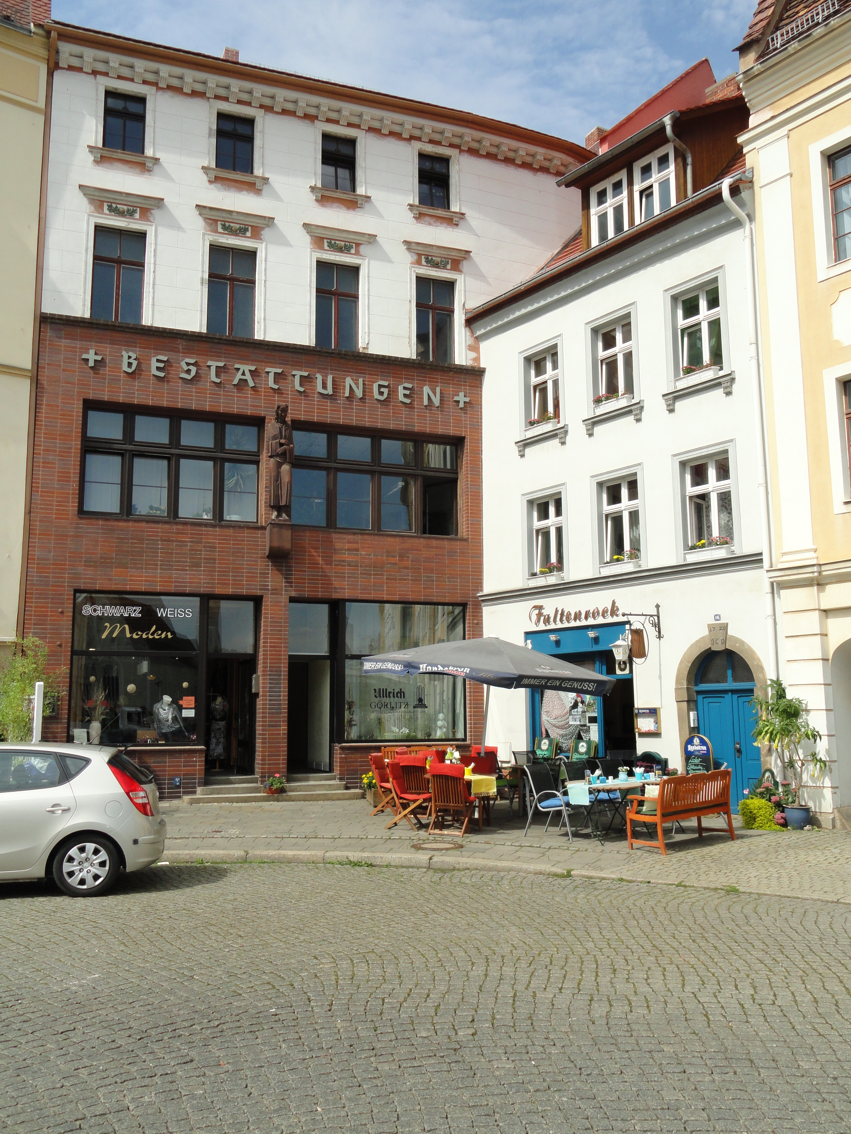 Obermarkt 15 in Görlitz